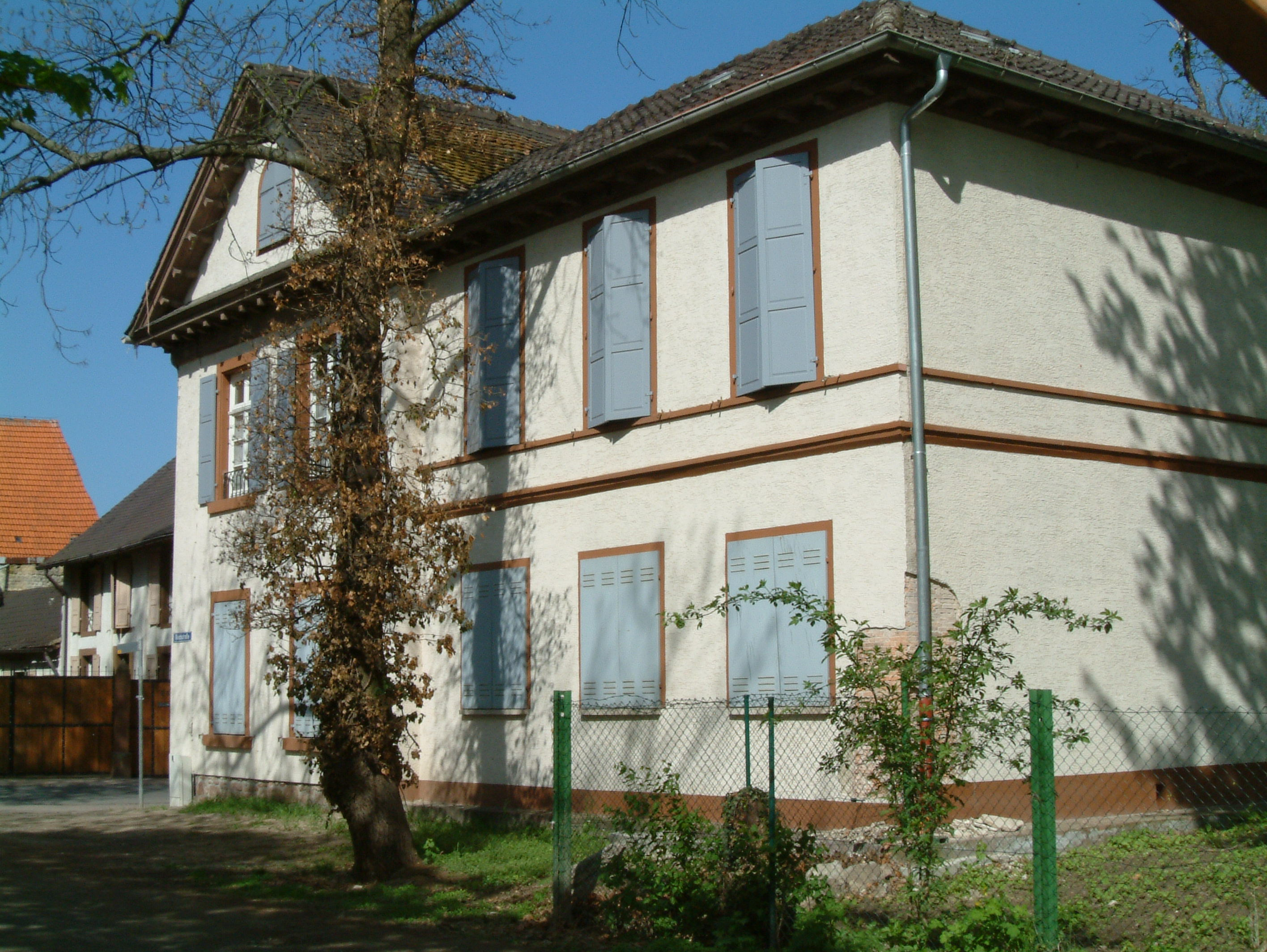 Herrenhaus am Kellergarten zu Dirmstein, selbst fotografiert am 28.04.2006 und freigegeben durch Benutzer:Mundartpoet